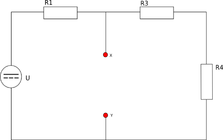 Theveninova věta - svorky na rezistoru R2